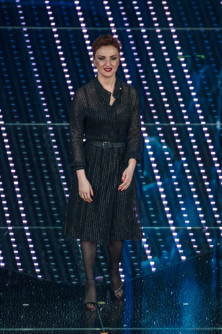 Arisa durante la serata finale del 66 Festival di Sanremo, 13 febbraio 2016